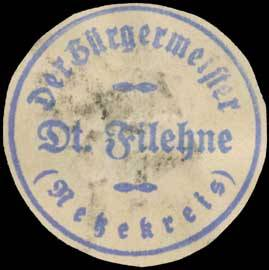 Sealing stamp Title: Der Bürgermeister Deutsch Filehne (Netzekreis) Description: blau, weiß Place: Deutsch Filehne size: 4 cm